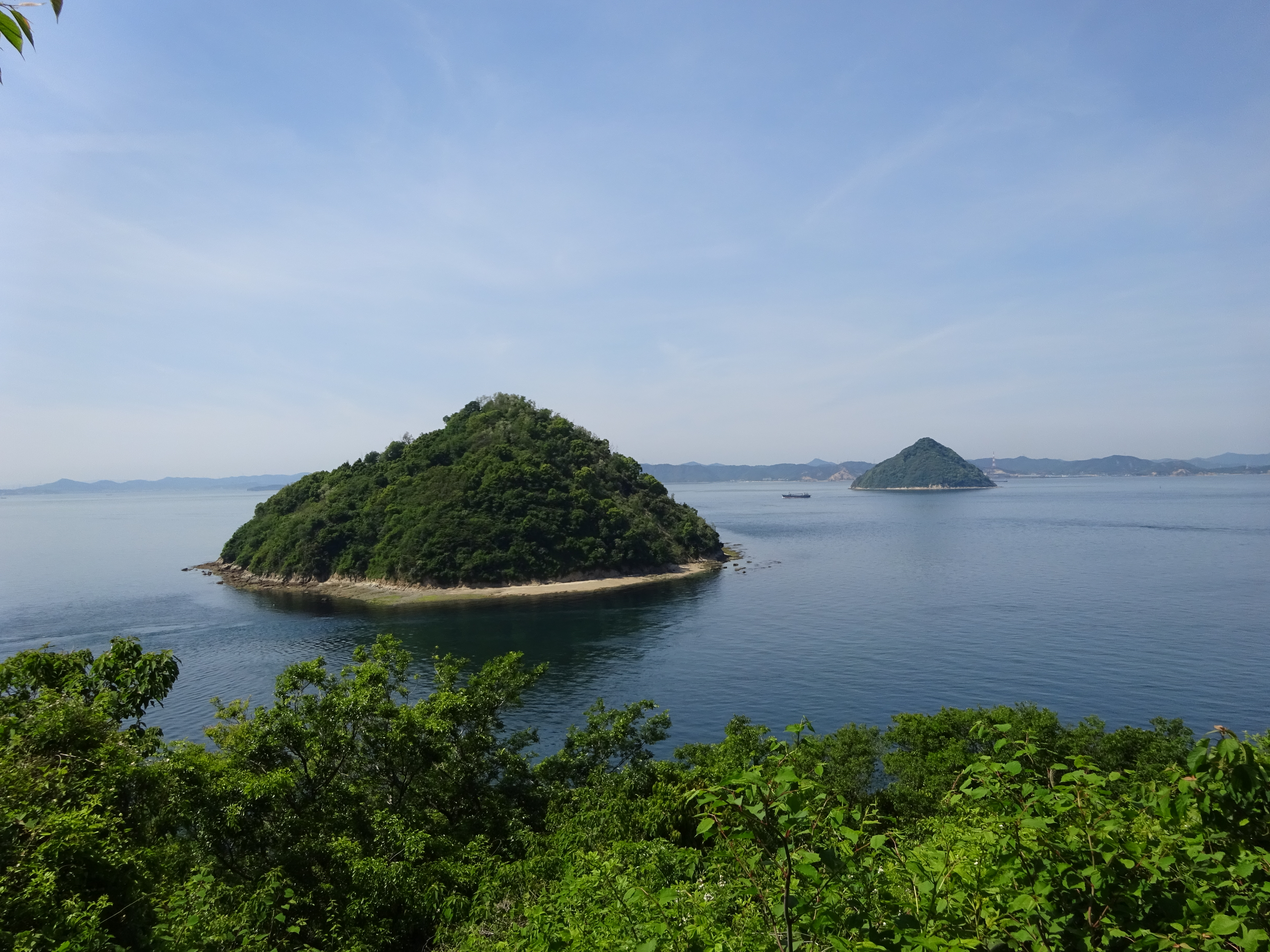 五色台の大崎ノ鼻で小槌島・大槌島を望む